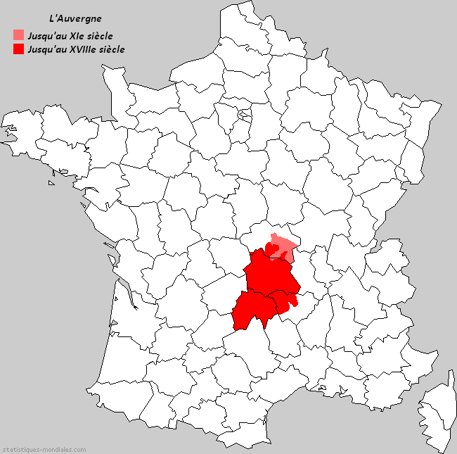 La province d'Auvergne superposée à la carte des départements français. Rouge foncée : la province au XVIIIe siècle. Rouge claire : partie prise par les princes de Bourbon au XIe siècle.